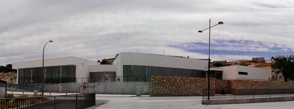 Museo de Prehistoria de Orce, Granada (España)